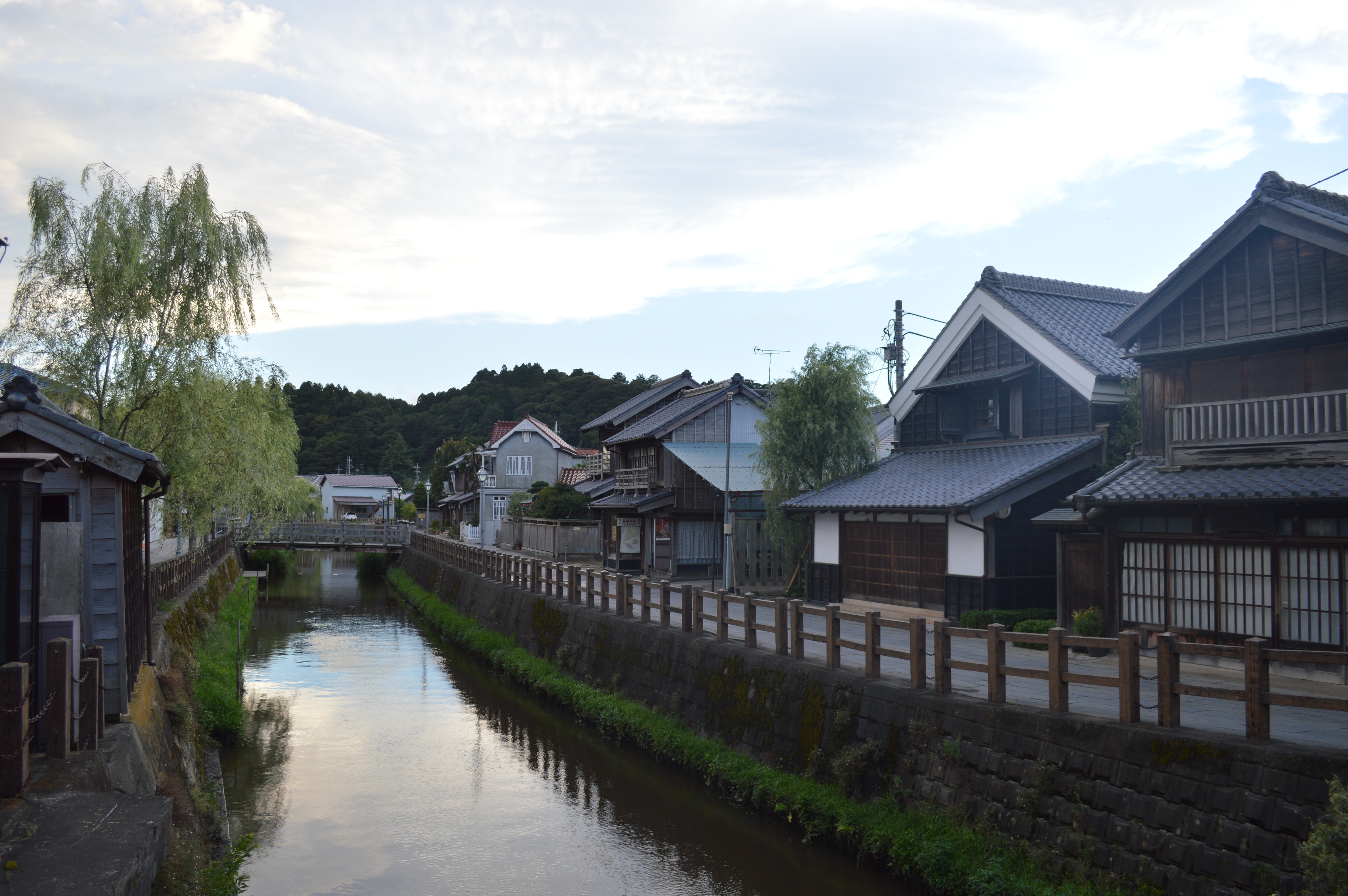 千葉県香取市佐原の町並み